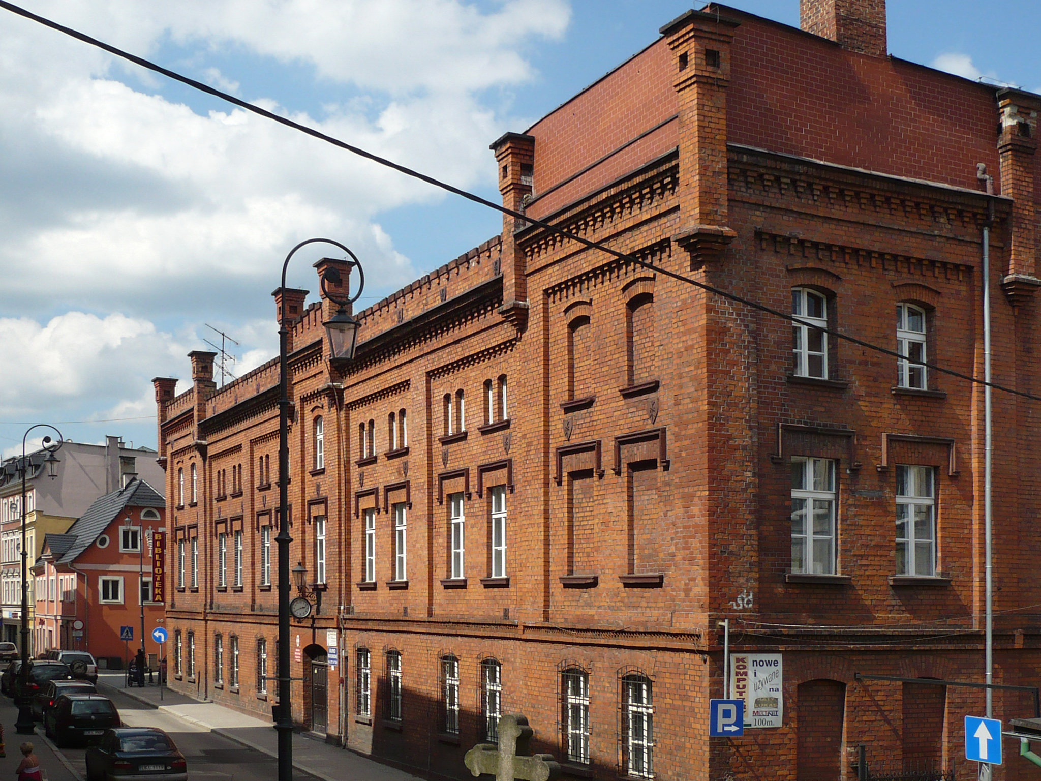 Nowa Ruda, ul. Bohaterów Getta 10 - budynek dawnego browaru z 1849 r., obecnie siedziba Miejskiej Biblioteki Publicznej